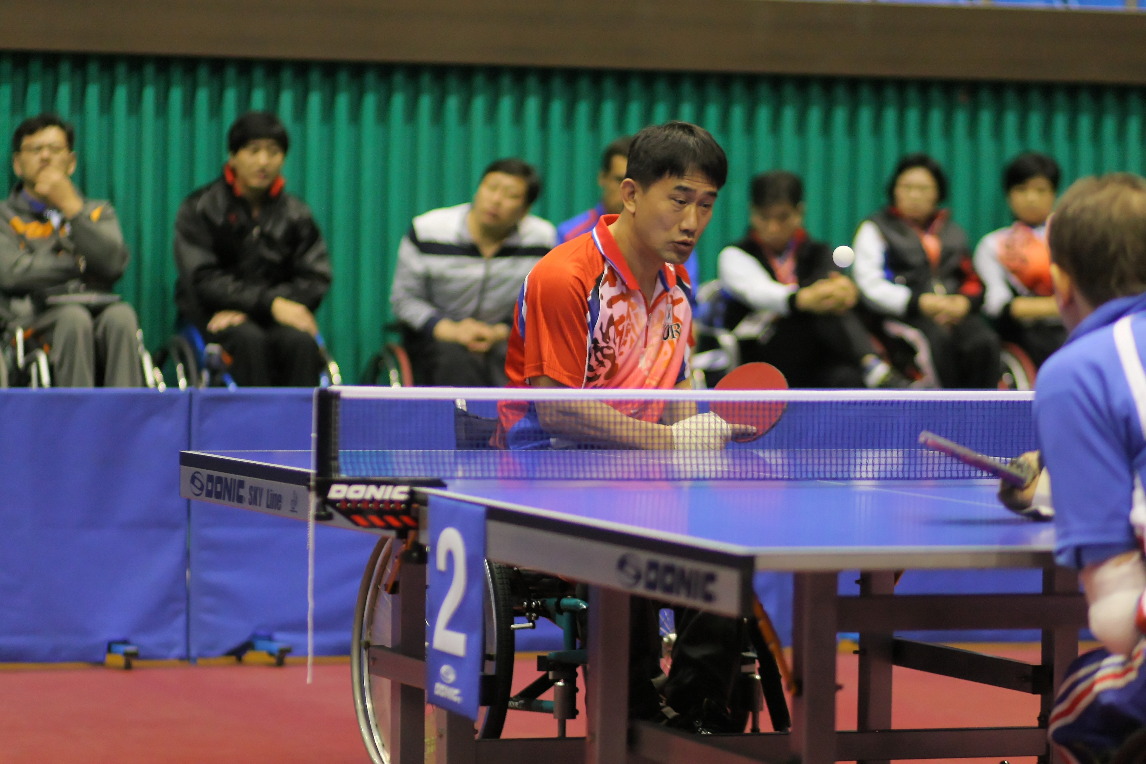 IMG_7785_DxO